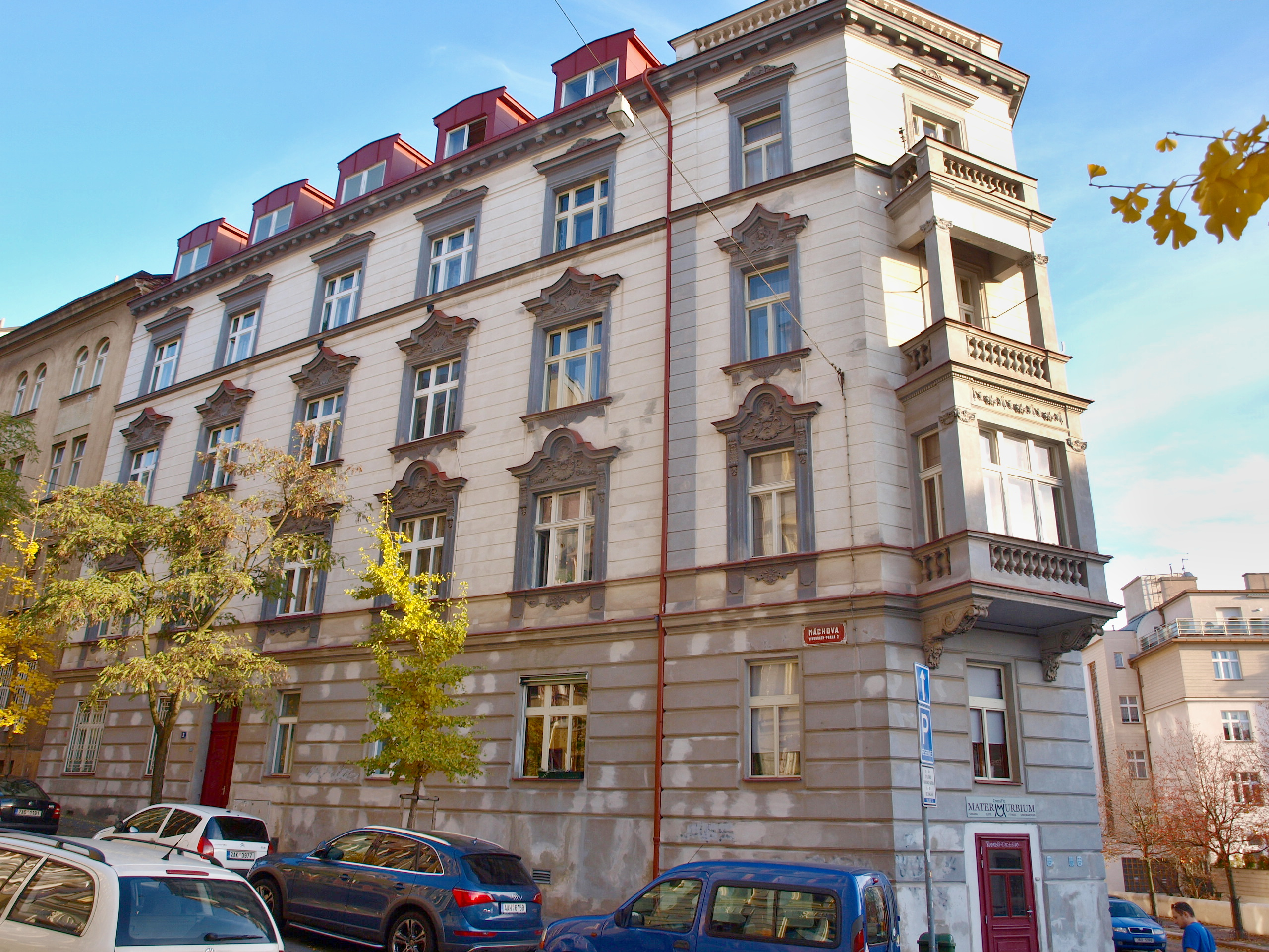 Vinohrady Máchova ulice